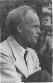 Privatphoto